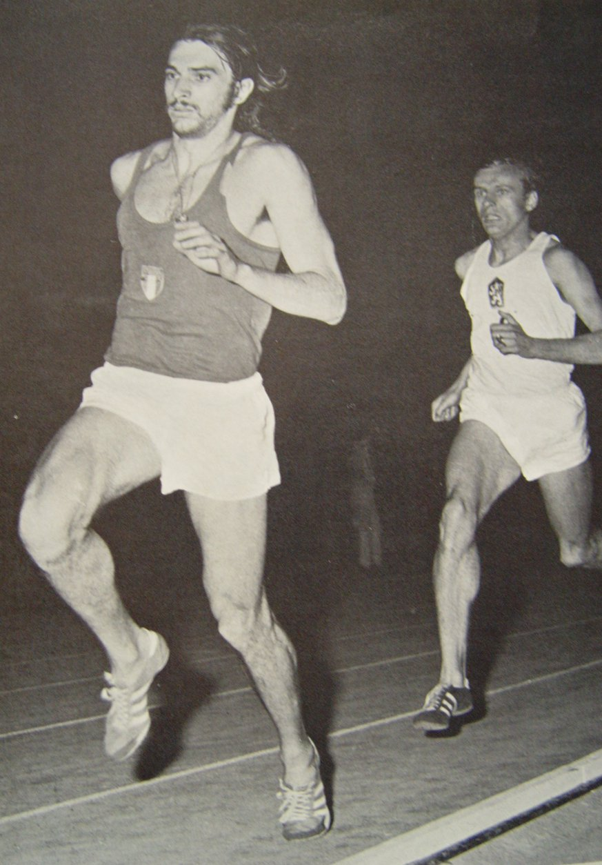 Marcello Fiasconaro e Jozef Plachy all'Arena di Milano il 27 giugno 1973 nel corso della gara in cui Fiasconaro stabilì il record del mondo sugli 800 metri